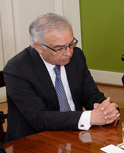 Gobierno de Chile